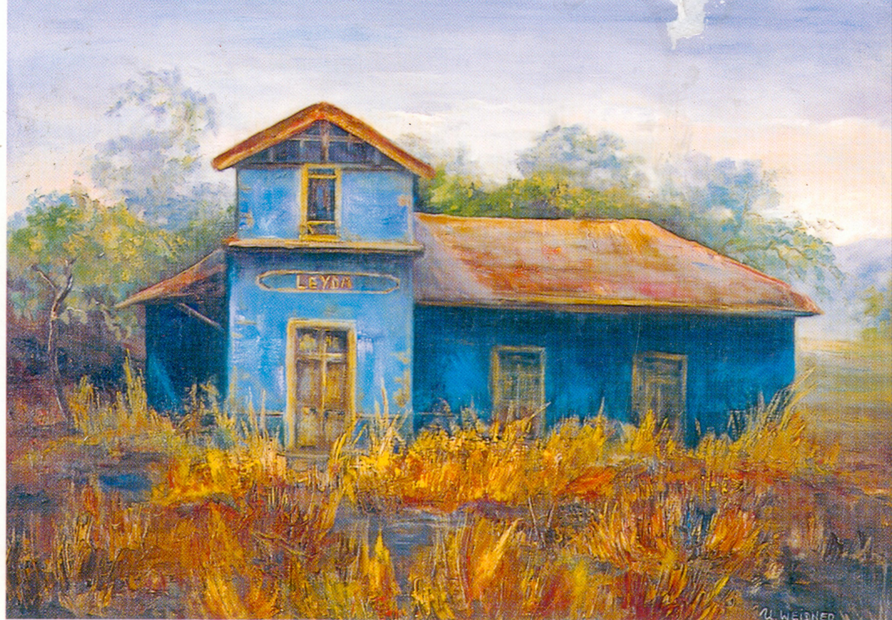 Estación de Ferrocarril de Leyda. Óleo hecho por mí.